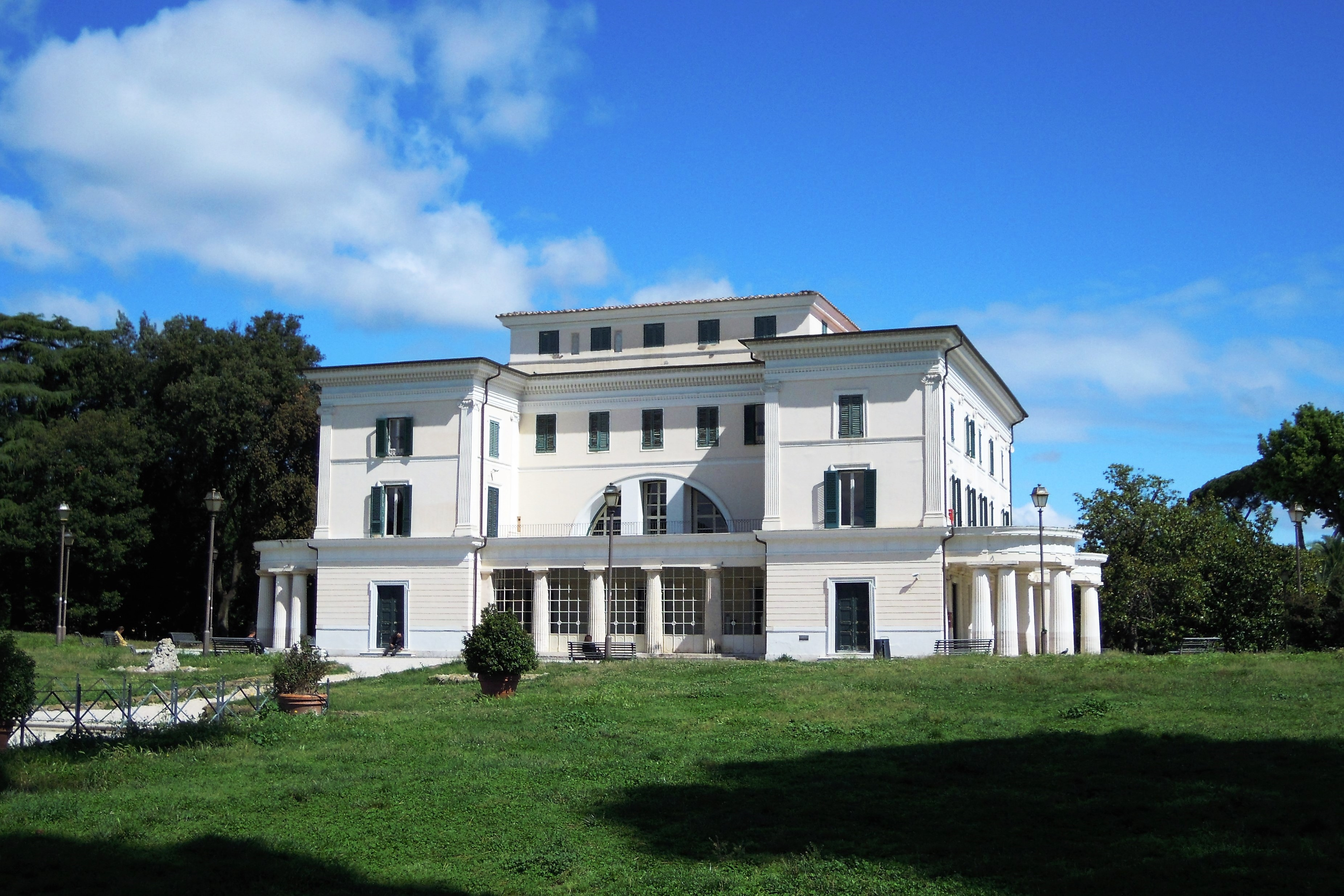 Roma, Villa Torlonia - Casino nobile